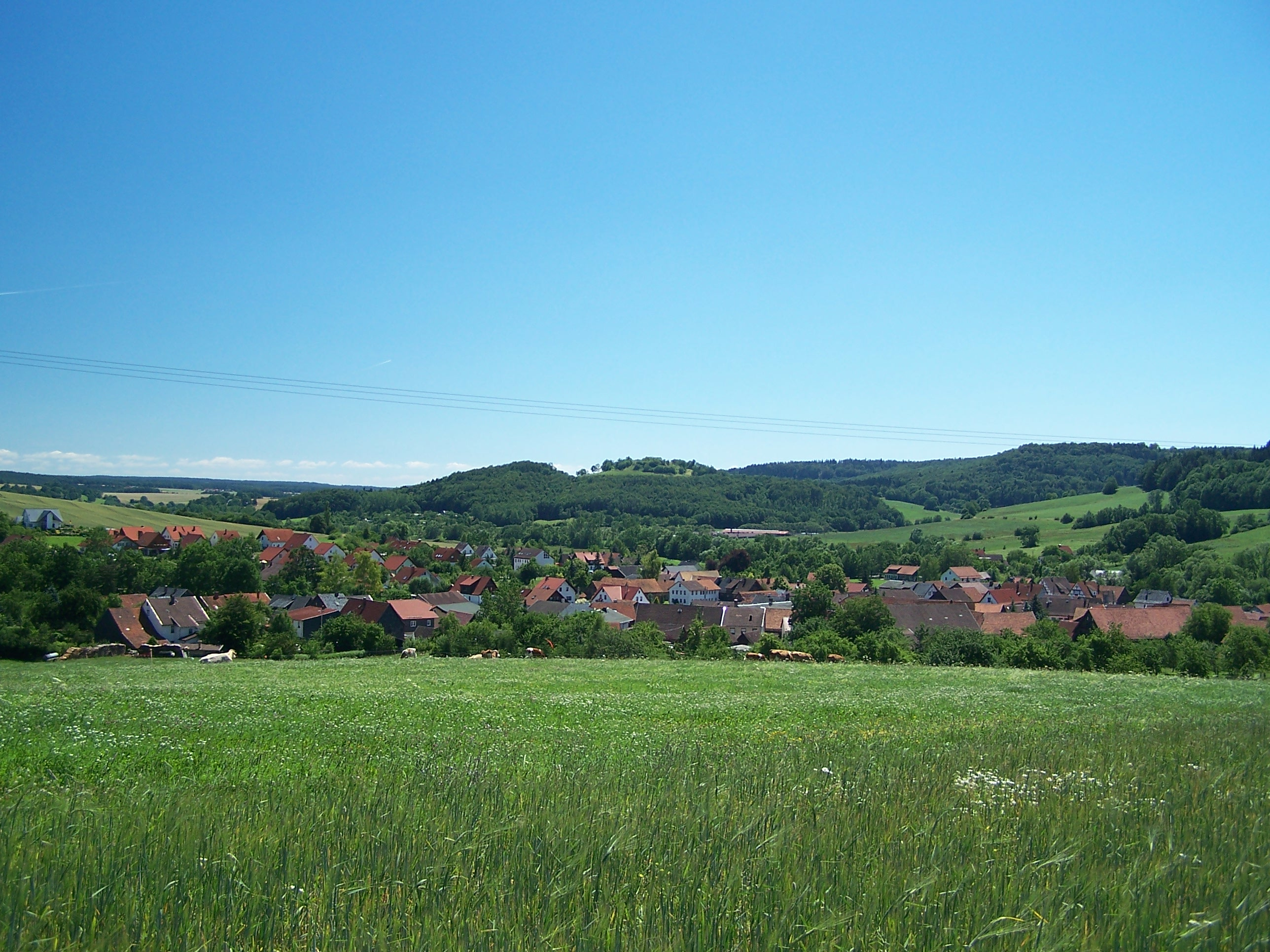 Gemeinde Bachfeld Dosiero:Bachfeld big.jpg